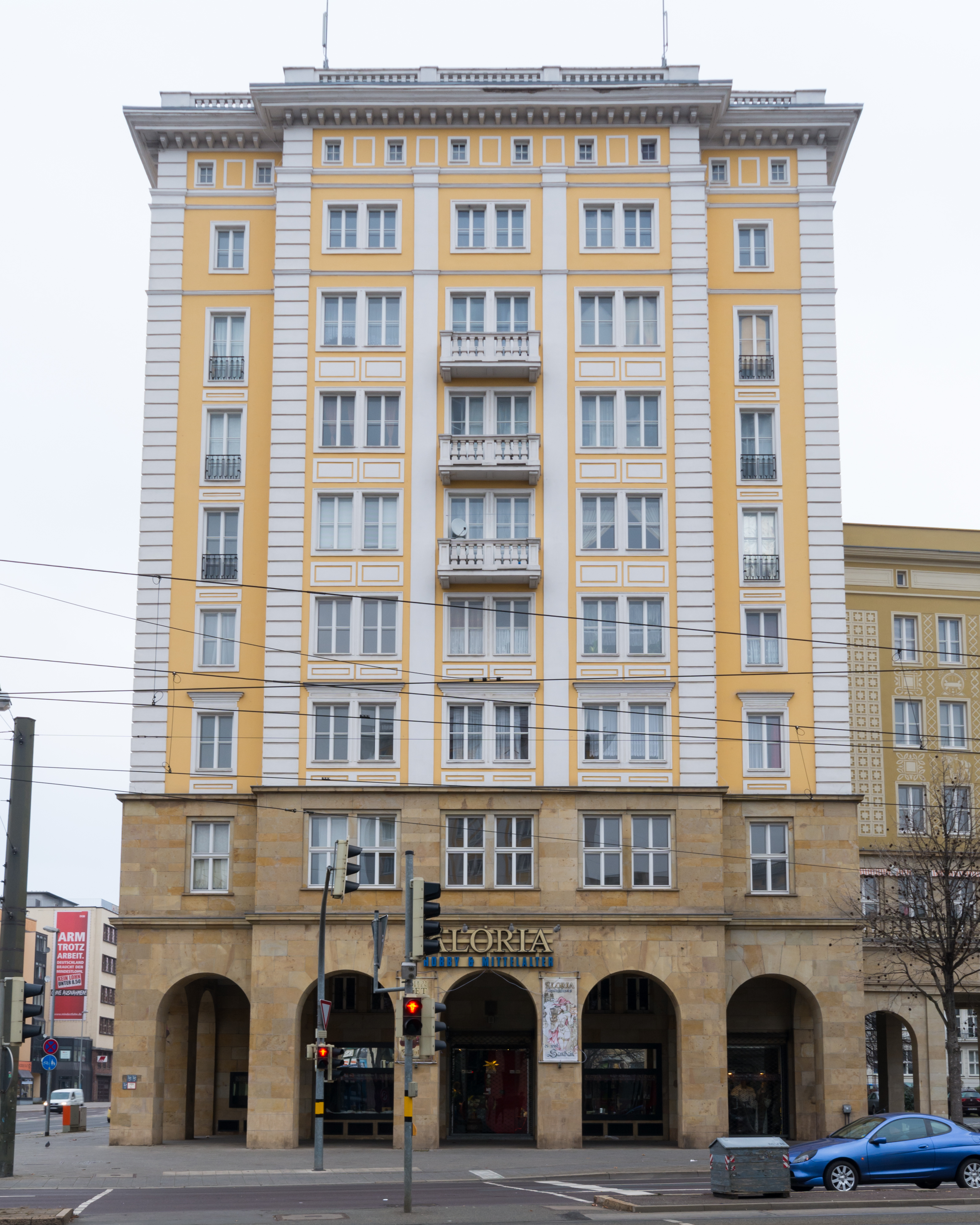 Fassade zur Enst-Reuter-Allee des Wohn- und Geschäftshauses Otto-von-Guericke-Straße 104 in Magdeburg-Altstadt. This is a photograph of an architectural monument.It is on the list of cultural monuments of Magdeburg